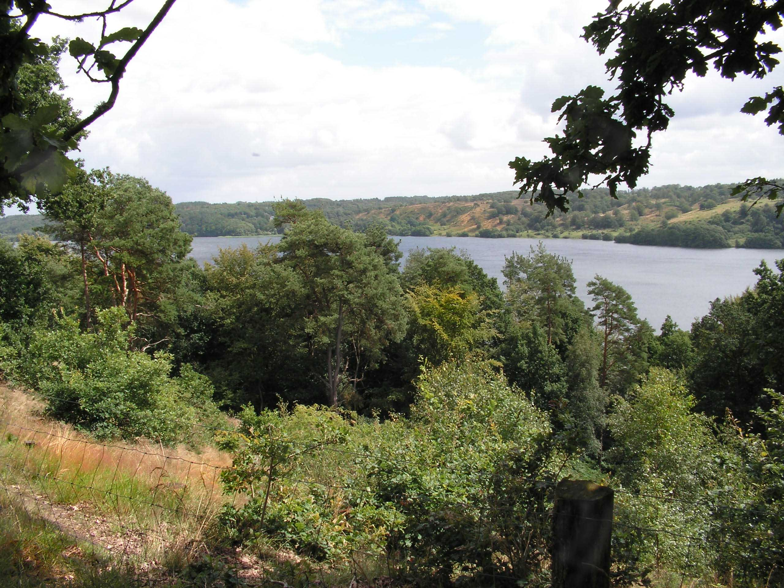 Hald Sø, Denmark (viewed from near the Kiosk)